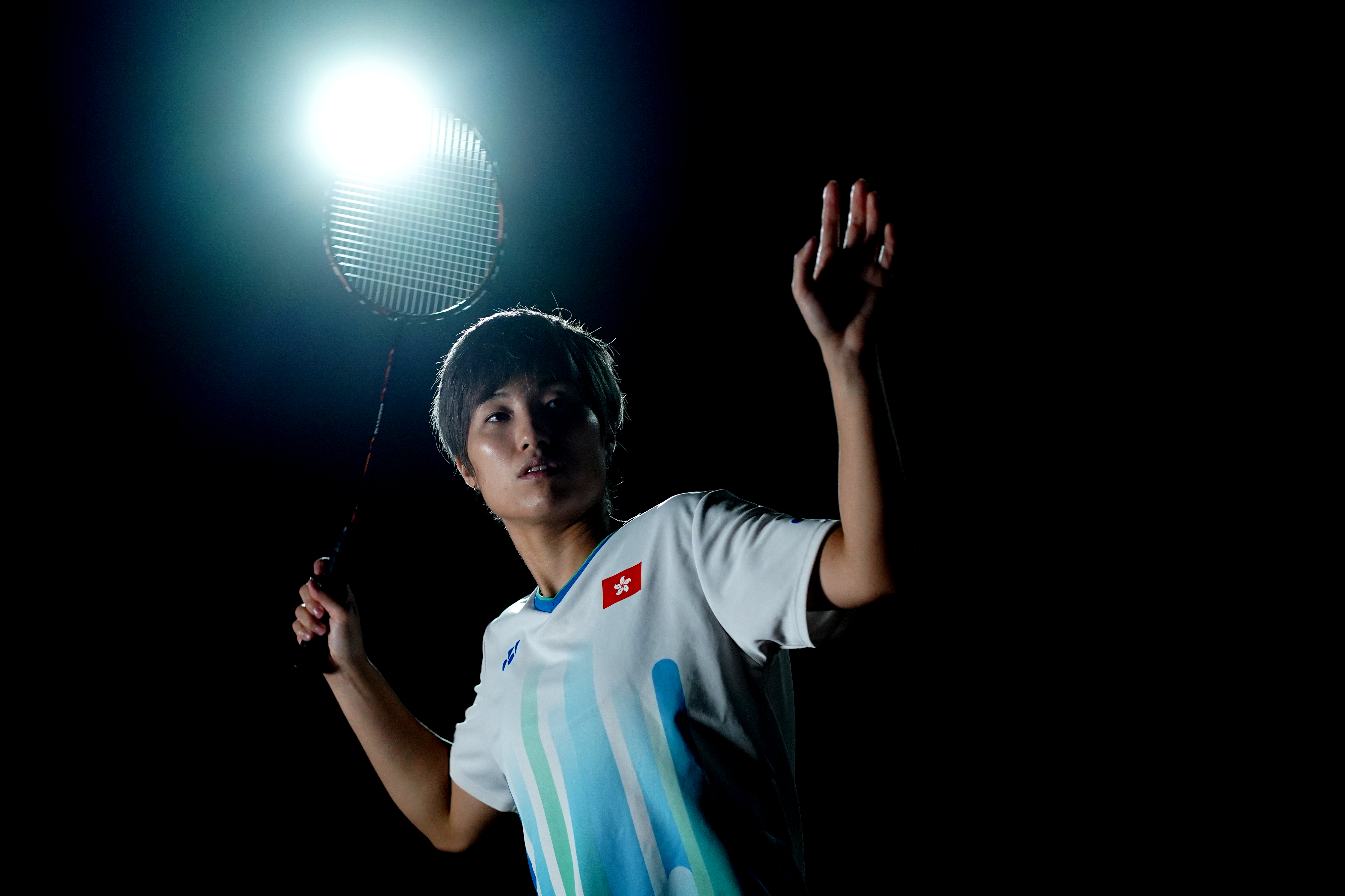 葉姵延（黑妹）在黑色的背景和一盞背面的強光照射下，做出揮動羽毛球拍的動作。